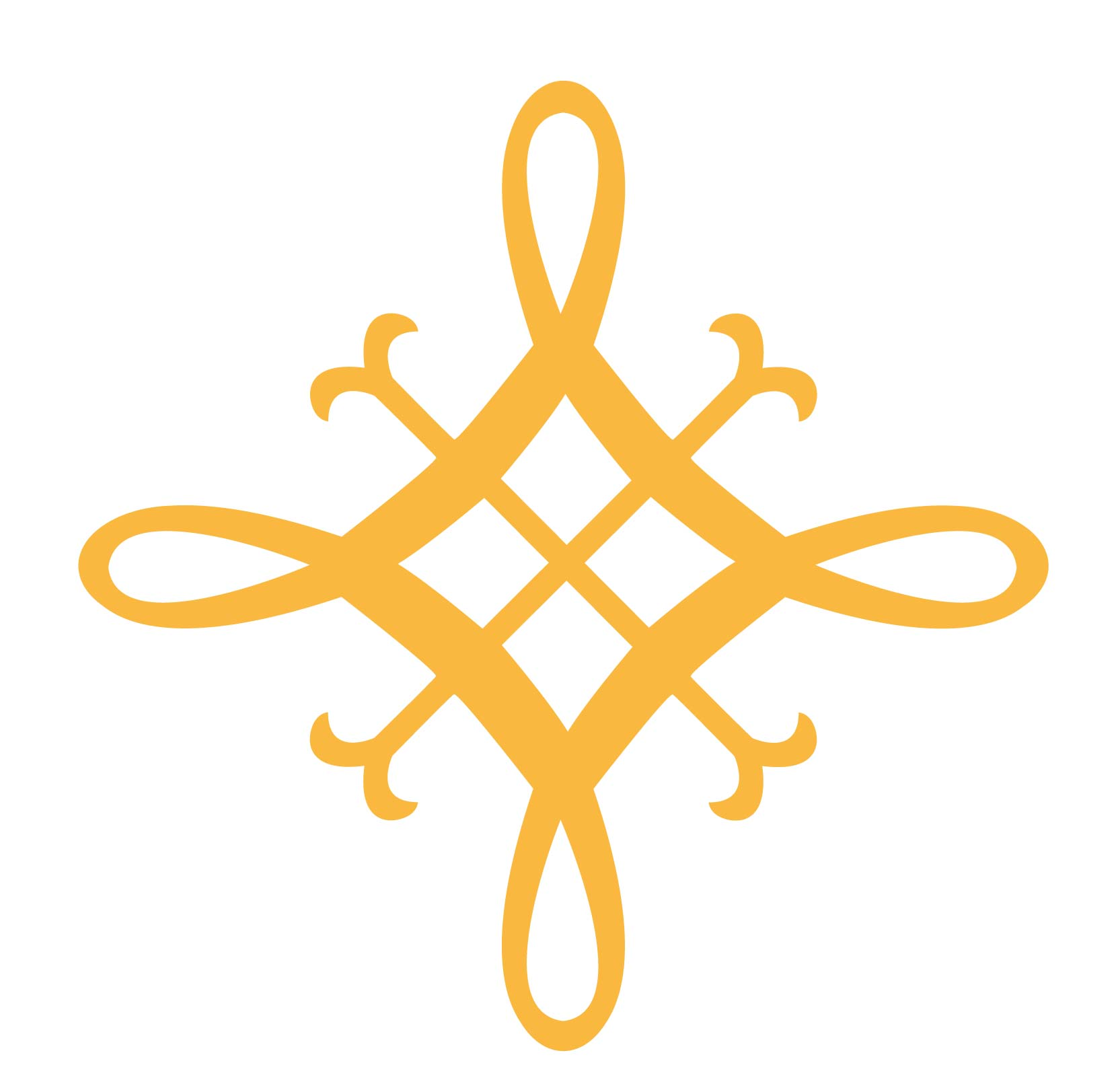 Sena eiropiešu tautu saules gadalaiku zīme ar 4 saulgriežu laikiem (ziemas, pavasara, vasaras un rudens)